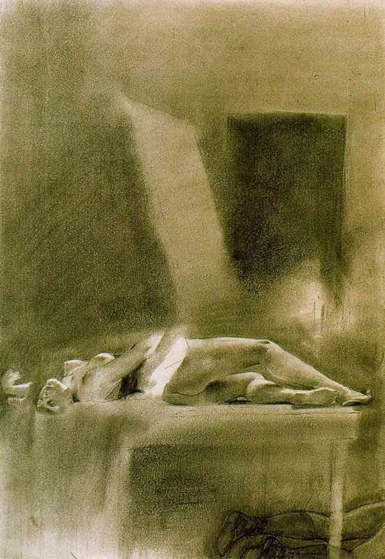 Illustration des Diaboliques de Jules Barbey d'Aurevilly (1808-1889)